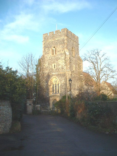 St. Martin's Church, Great Mongeham